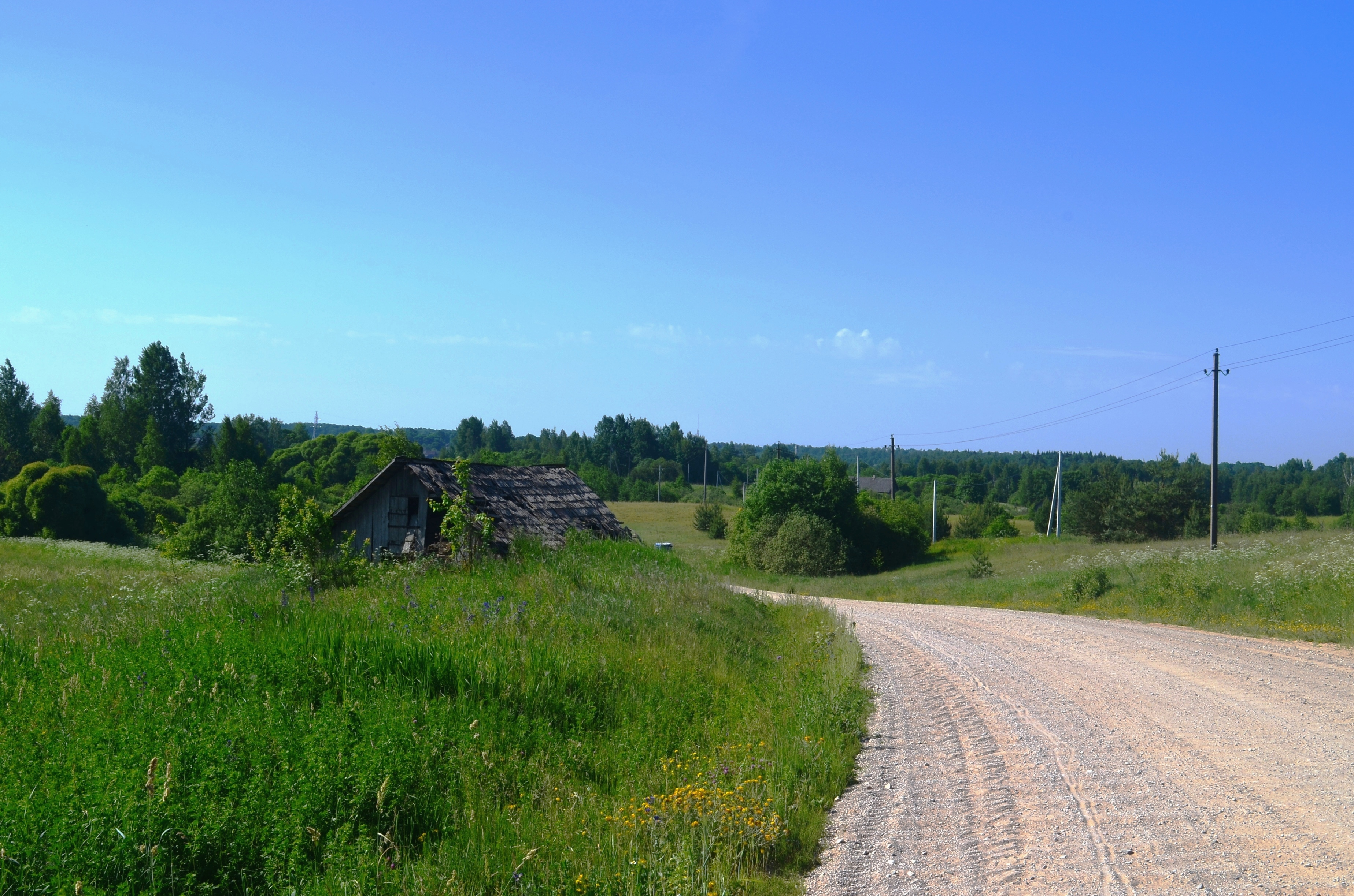 Kaidonėliai, Vilniaus raj.